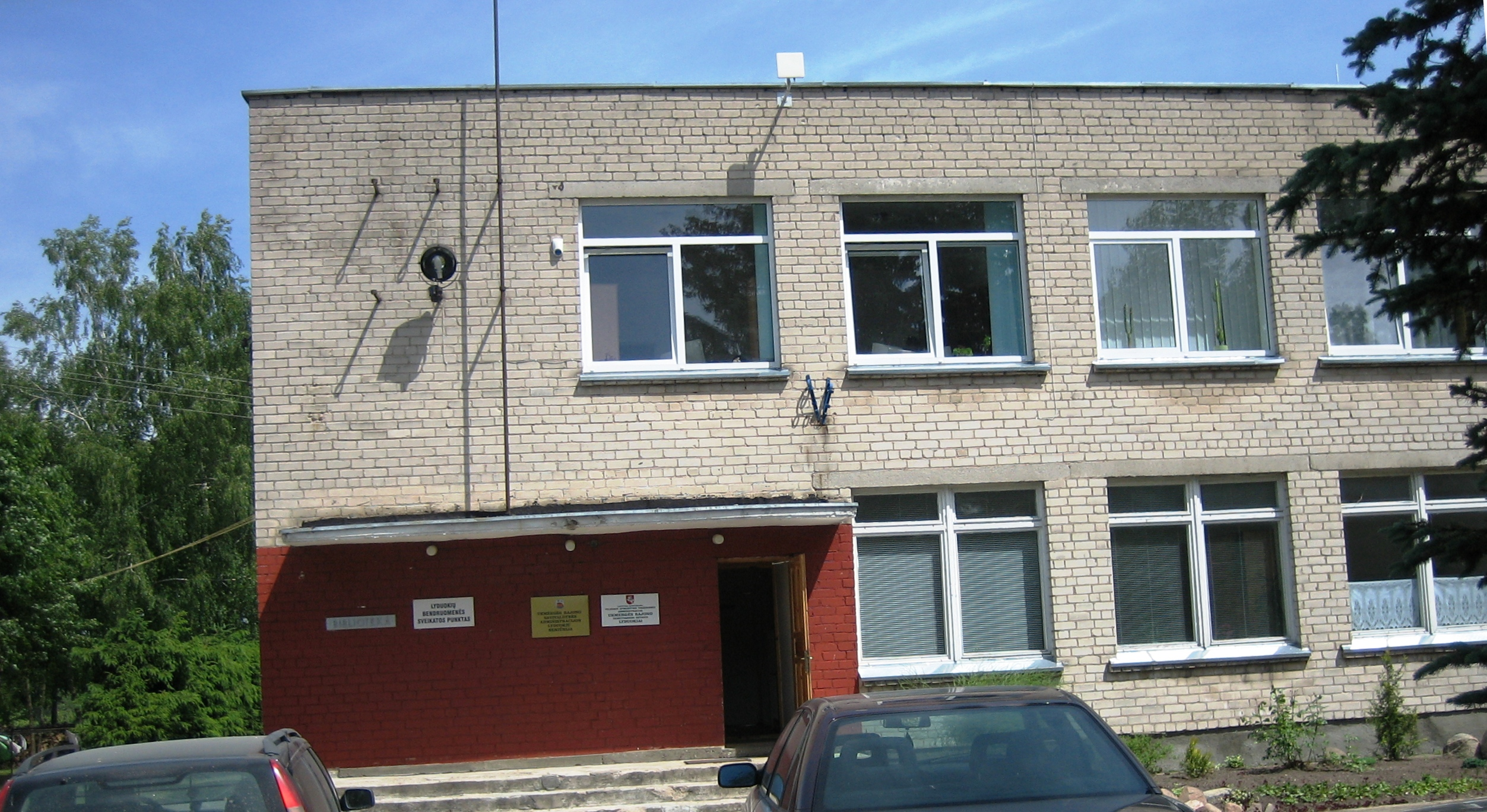 Žemaitkiemio seniūnija